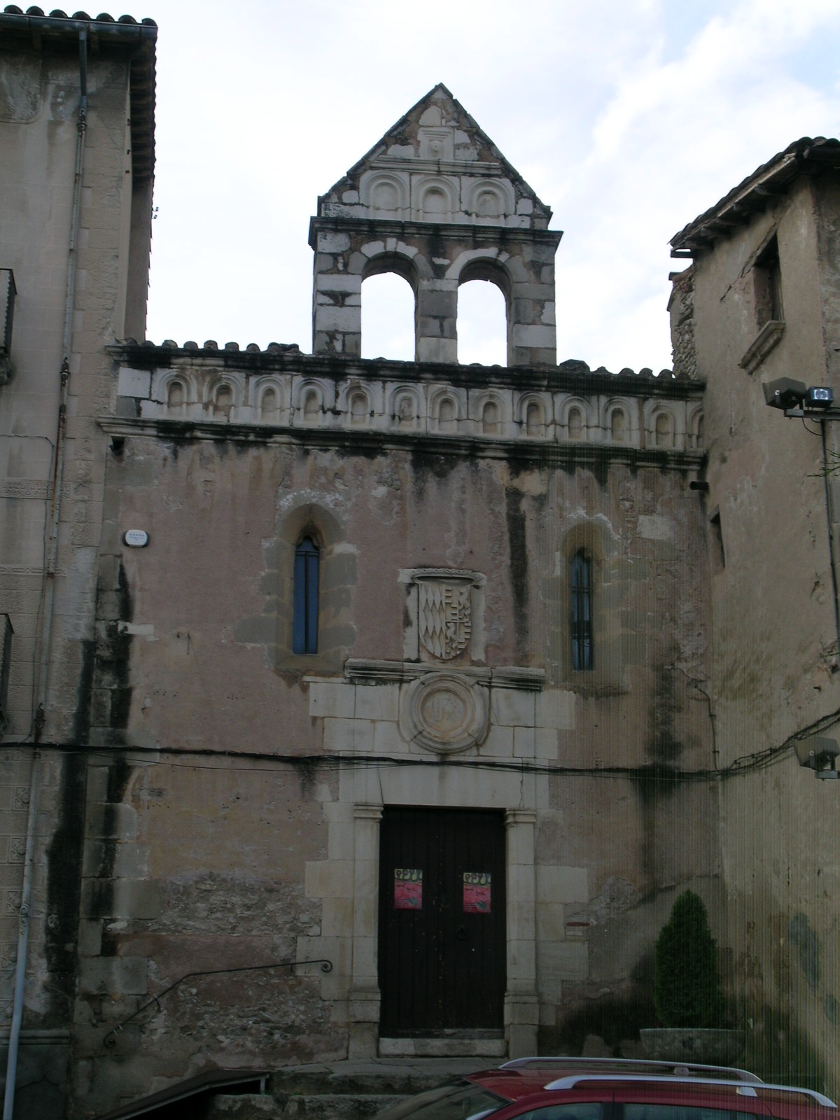 Capella de Jesús de Centelles, Oriol Mata